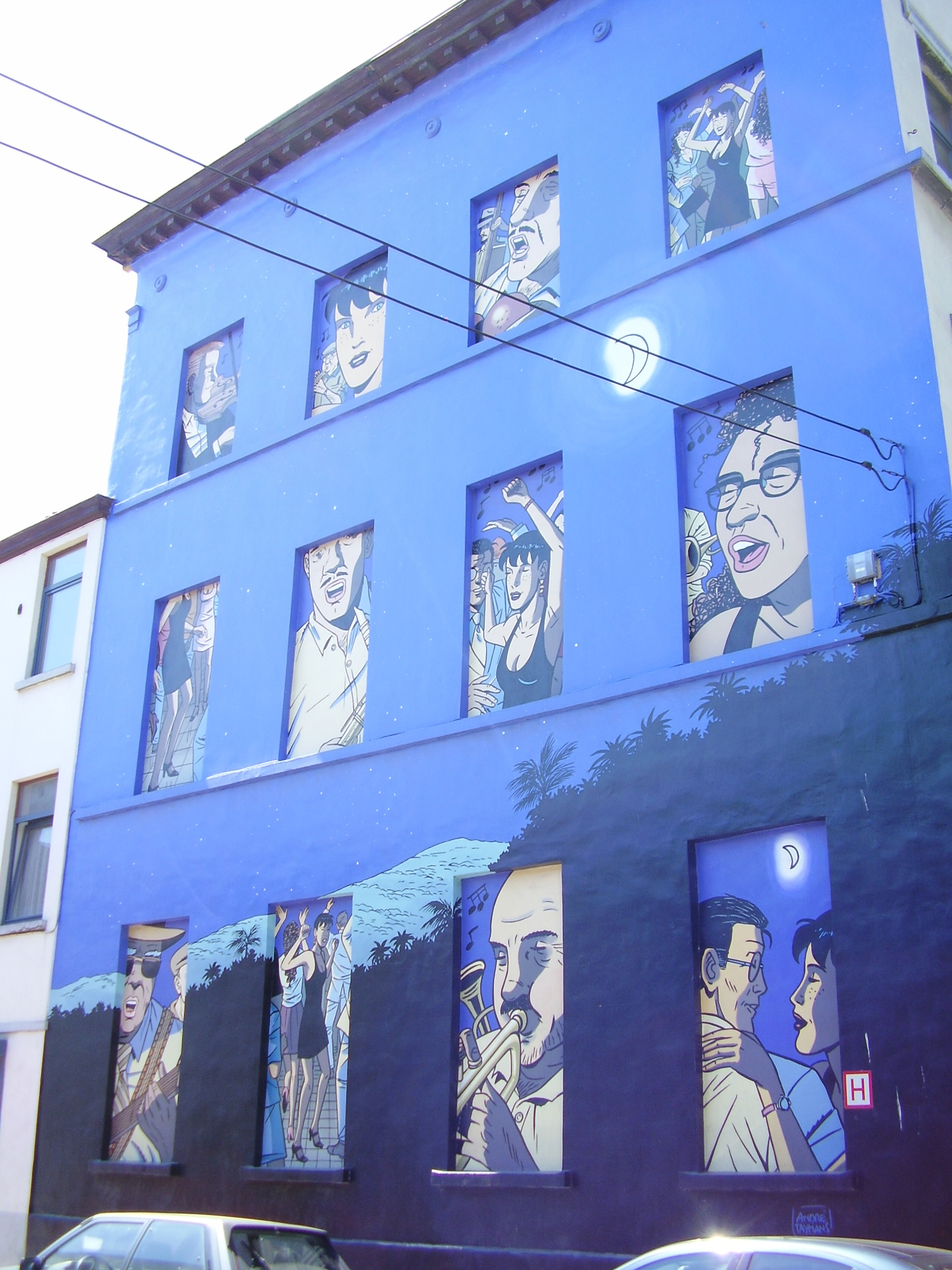 Caroline Baldwin de André Taymans, place de Ninove, Bruxelles